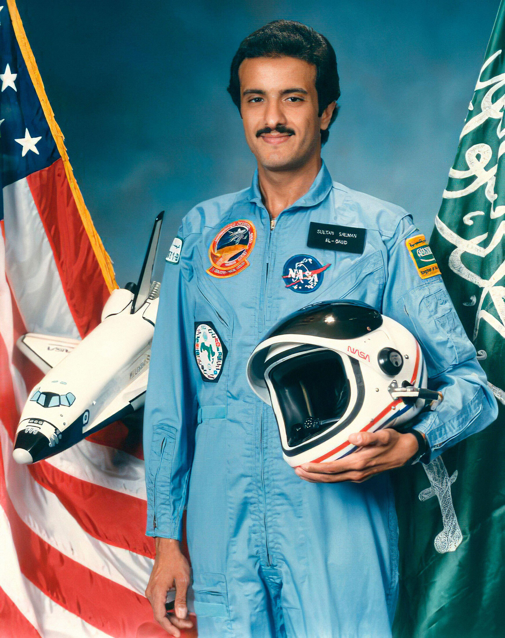 Sultan bin Salman bin Abdulaziz Al-Saud NASA-Mission STS-51G Discovery (17-24 Juni 1985)